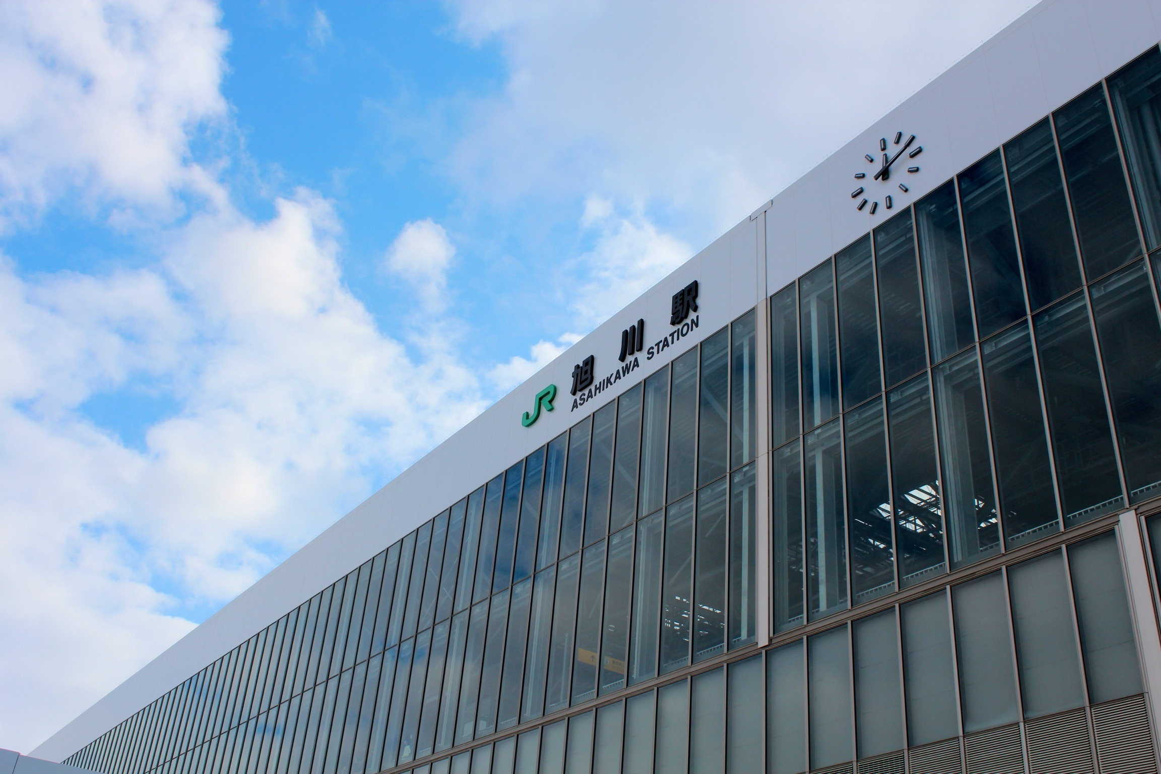 旭川駅駅舎 北口